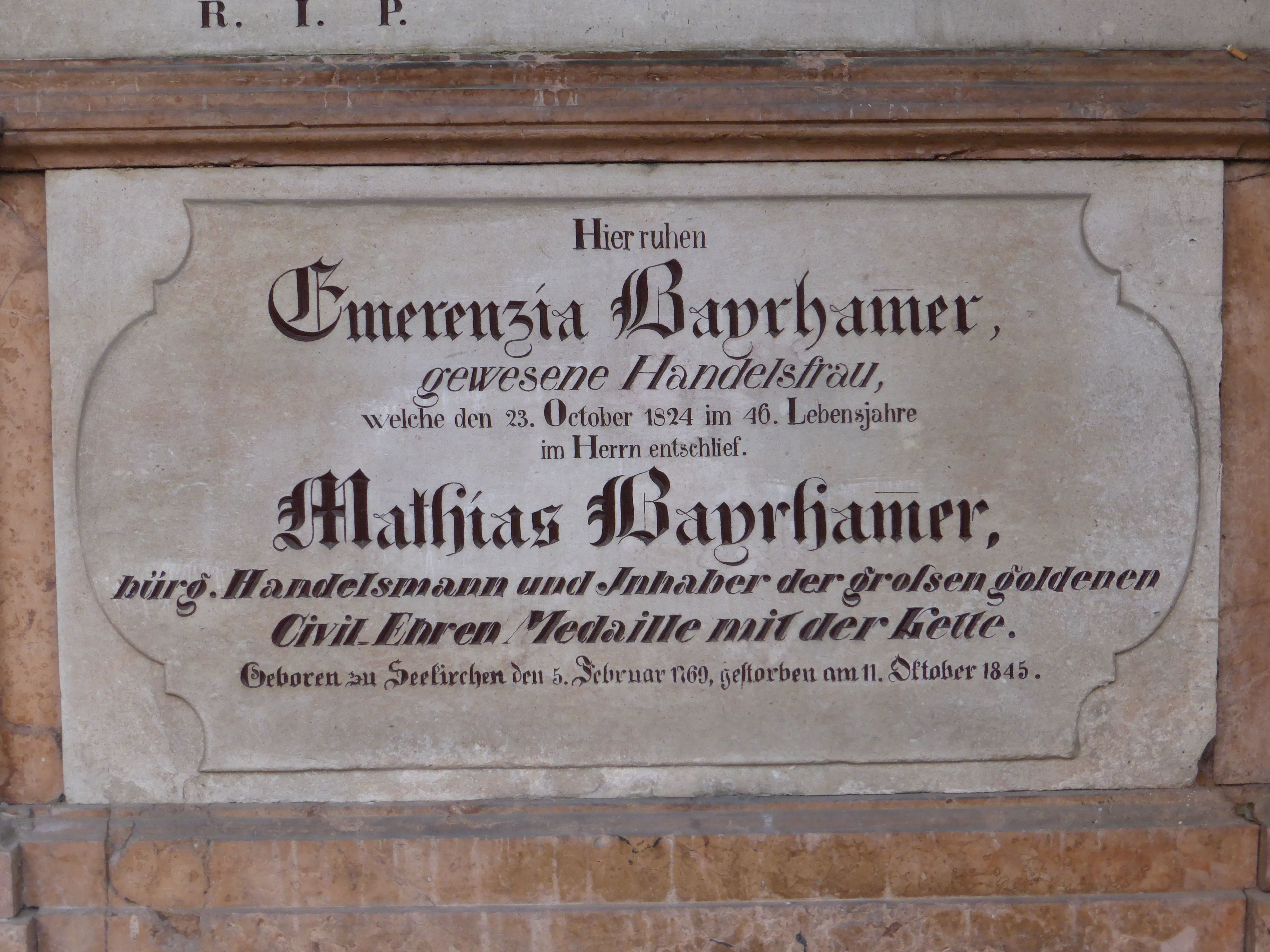 Sebastiansfriedhof (Grabstätte Mathias Bayrhamer-2)